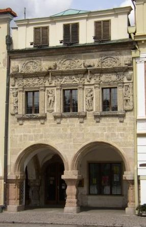 Dům U Rytířů na Smetanově náměstí v Litomyšli